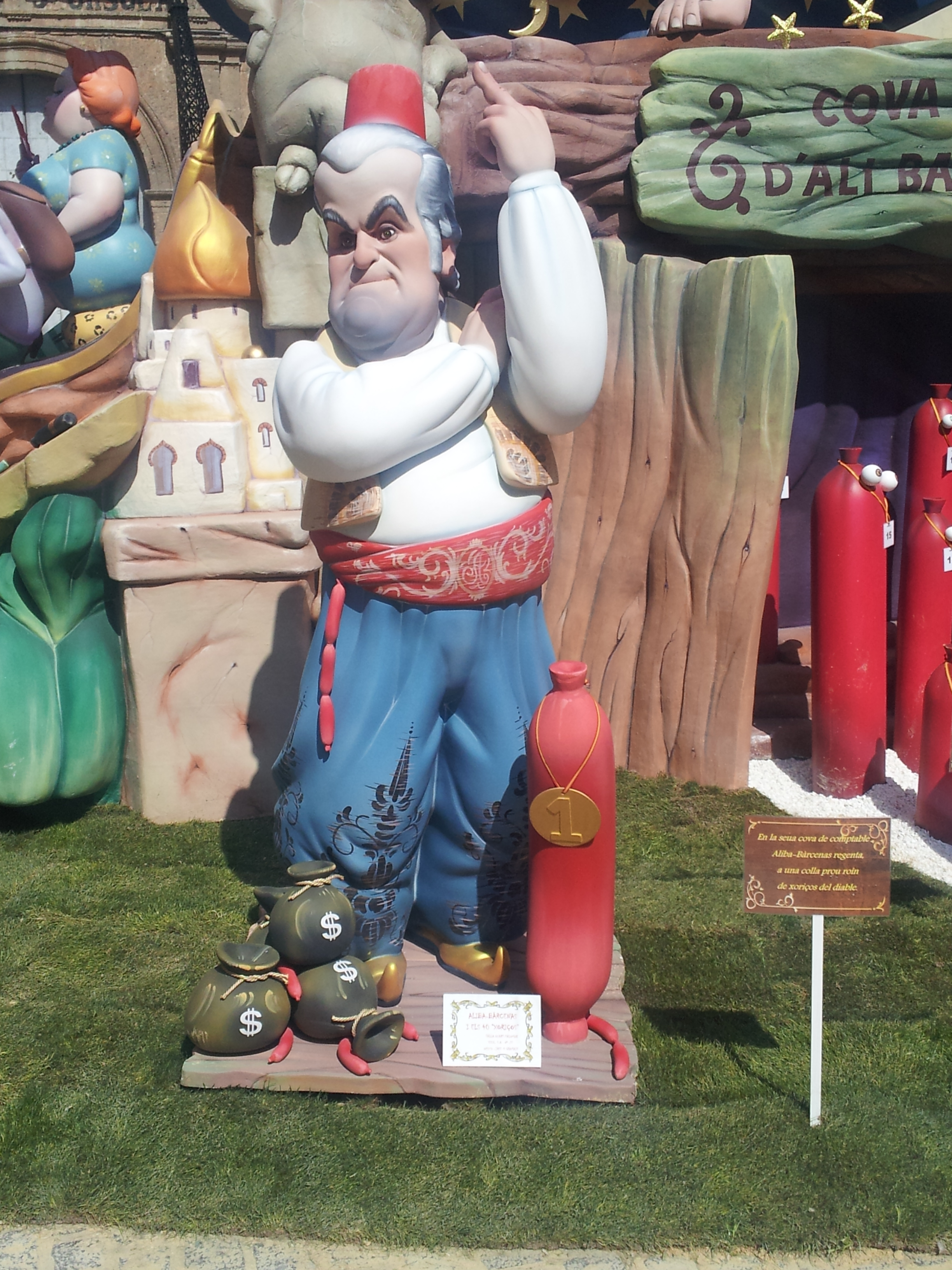 Escenes de la falla